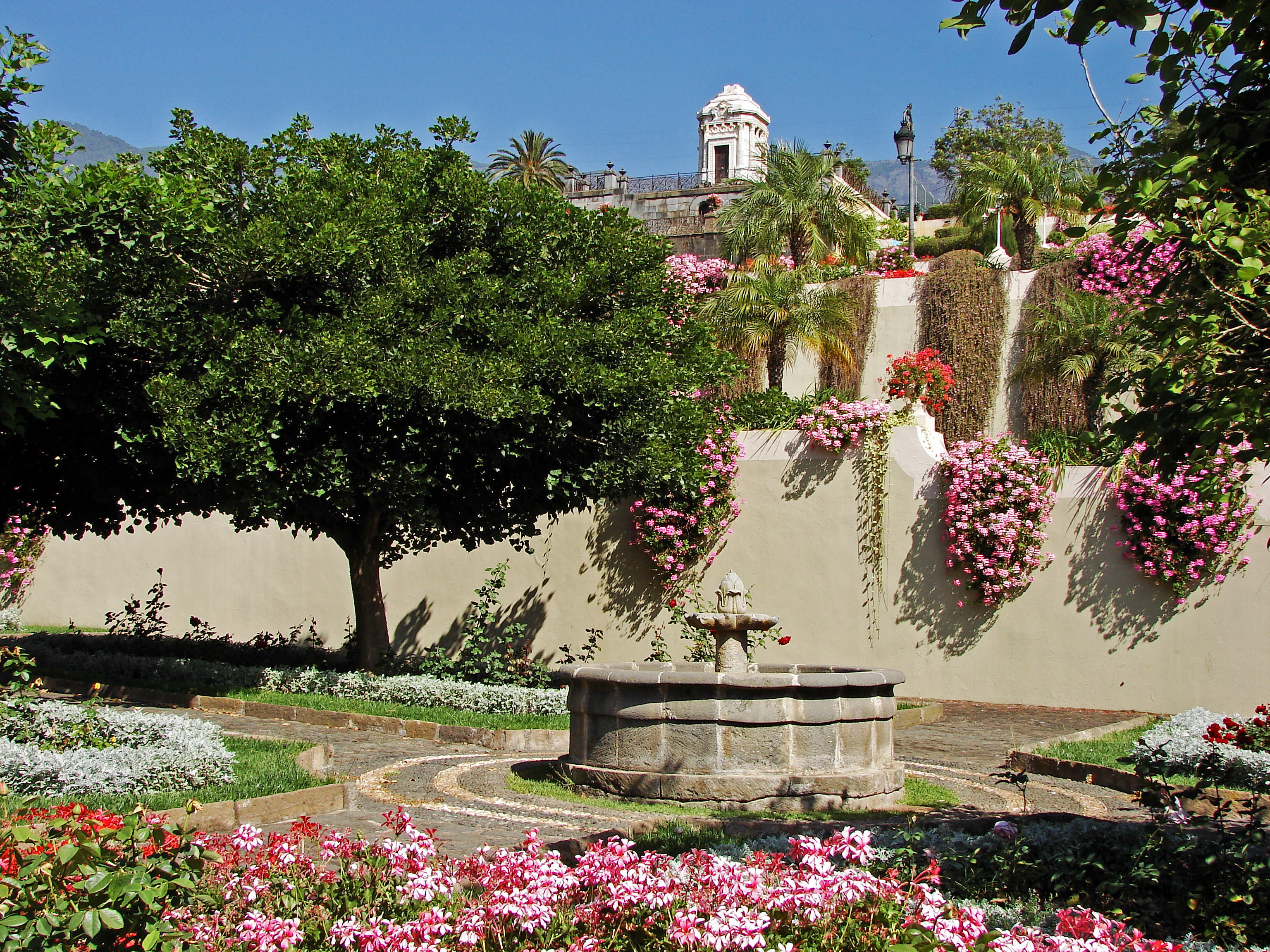 Jardines del Marquesado de la Quinta Roja, Blick von der untersten Ebene